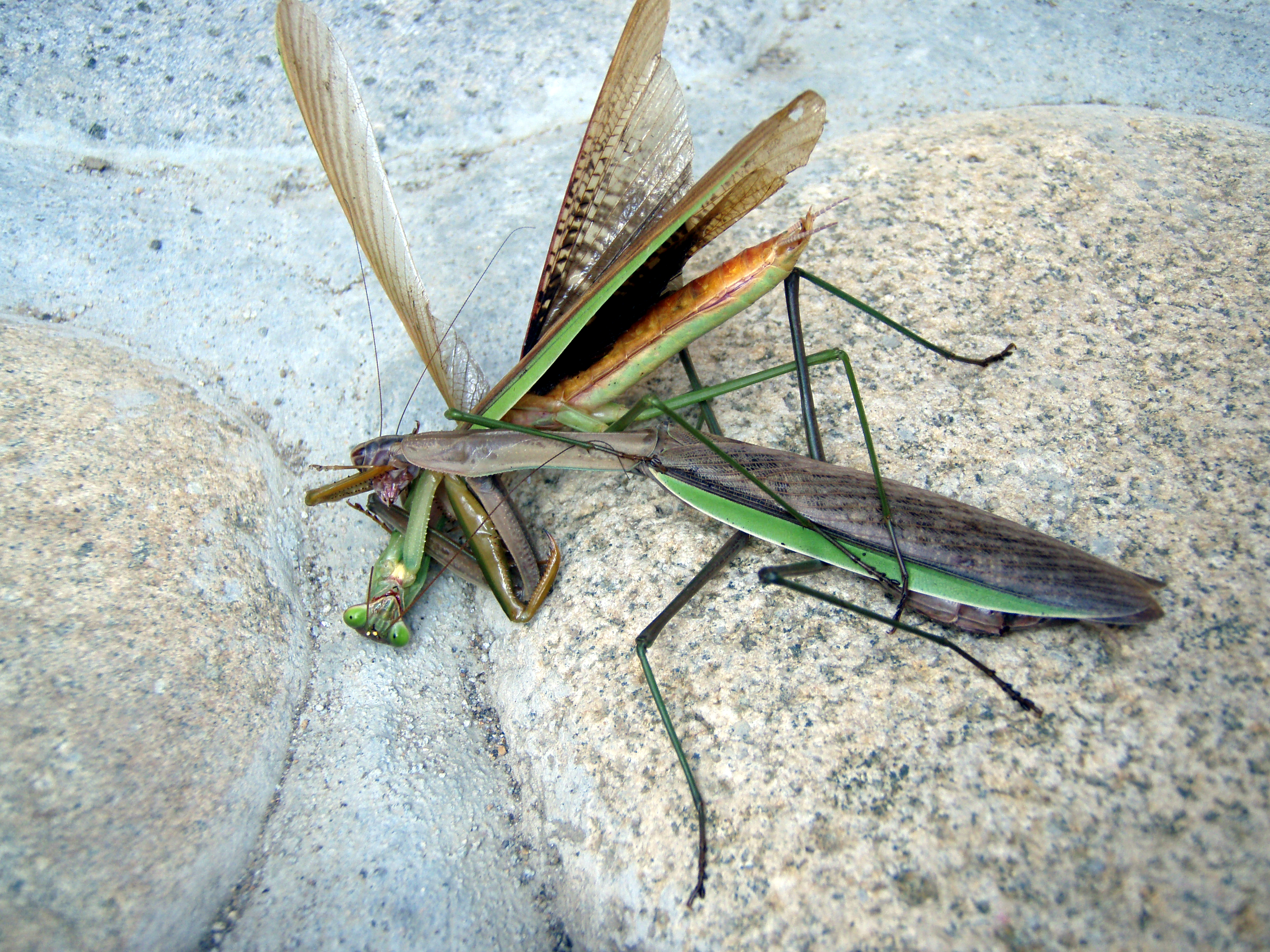 交尾の際に雄を補食する雌。(Nagano Pref. Japan.)